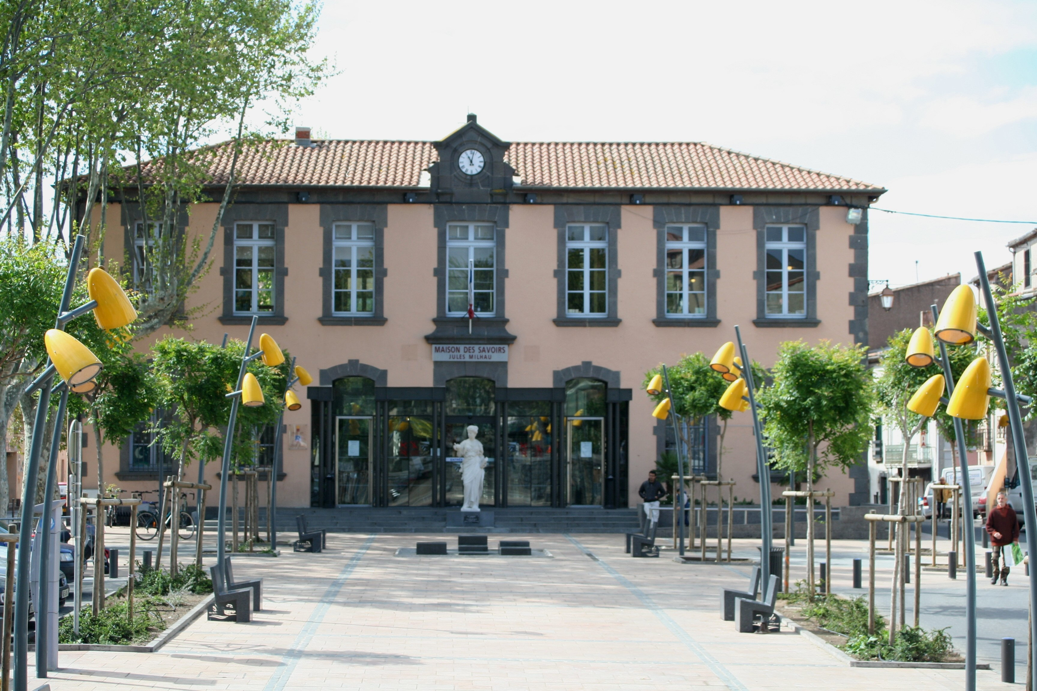 Maison des Savoirs, Agde (Hérault, France).